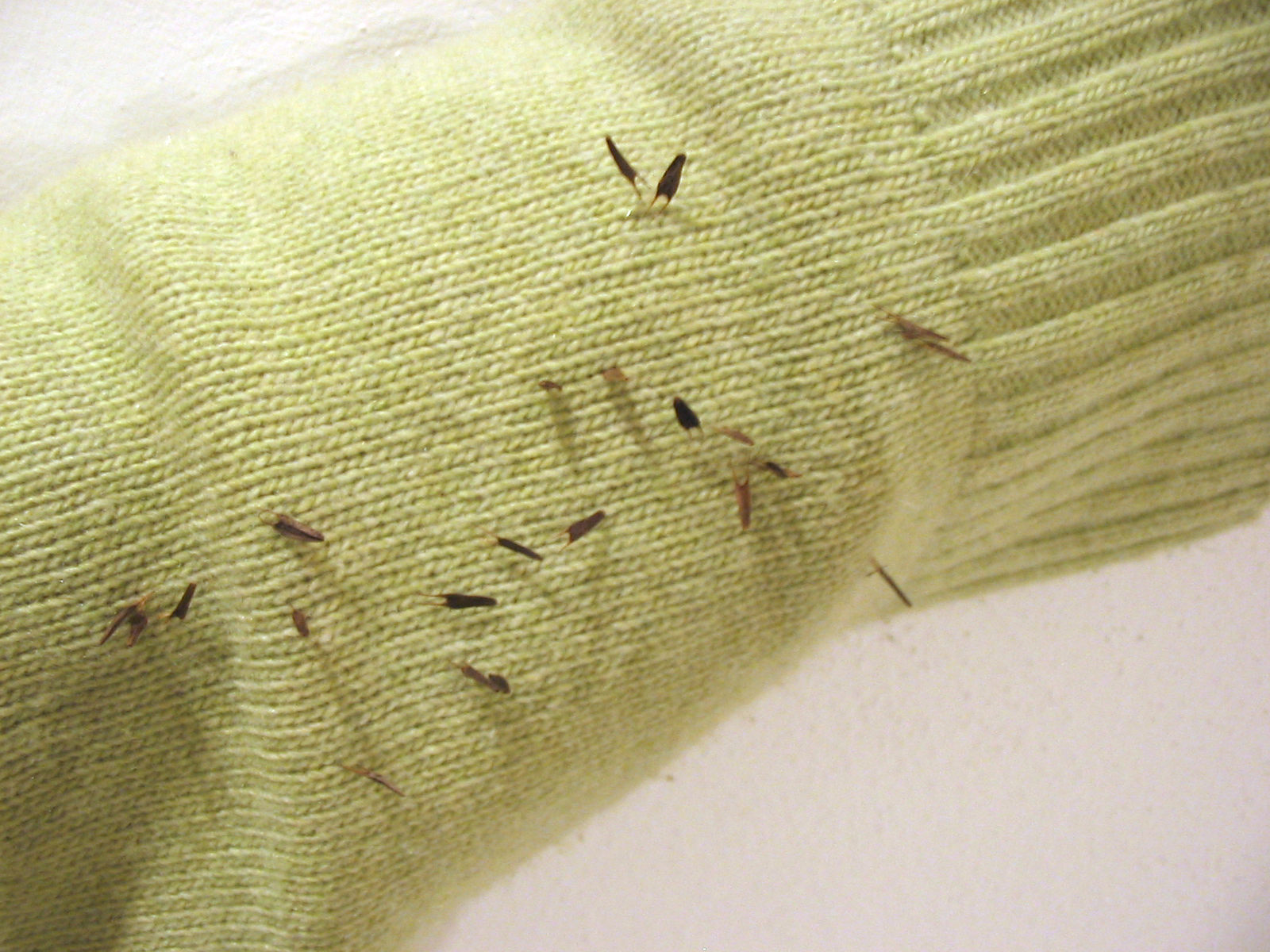 Epizoocoria